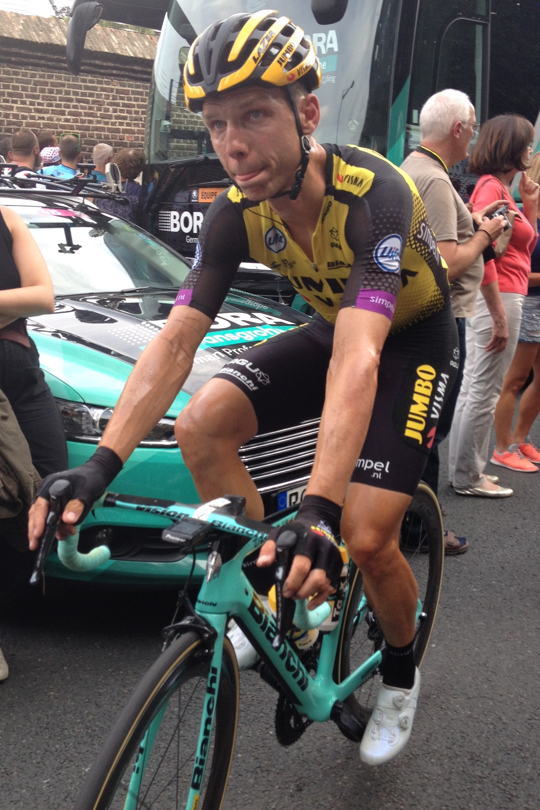 Grand Départ van de Tour de France in Brussel, finish in Laken op zaterdag 6 juli 2019